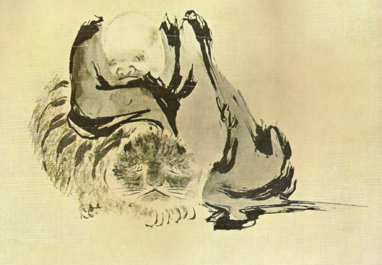 Patriarche et tigre, copie du XIIIe siècle (?) d'après le peintre chinois du Xe siècle, Shi Ke. Détail tiré de l'un des deux rouleaux verticaux intitulés « Deux patriarches en train de mettre leur esprit en harmonie ». Encre sur papier. Tokyo, Commission pour la protection des Biens culturels.